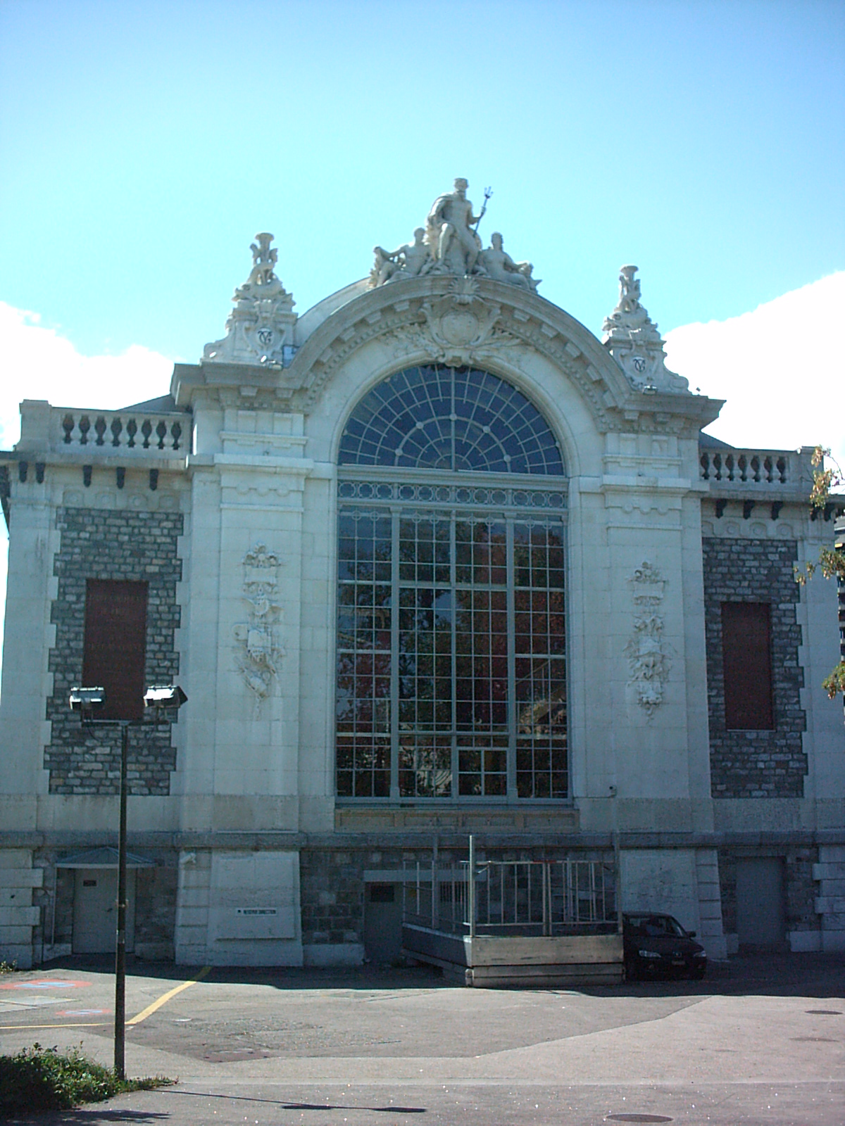 Bâtiment des Forces motrices à Genève (Suisse)